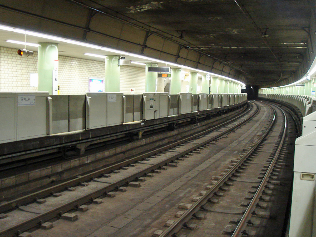 都営三田線白山駅ホーム